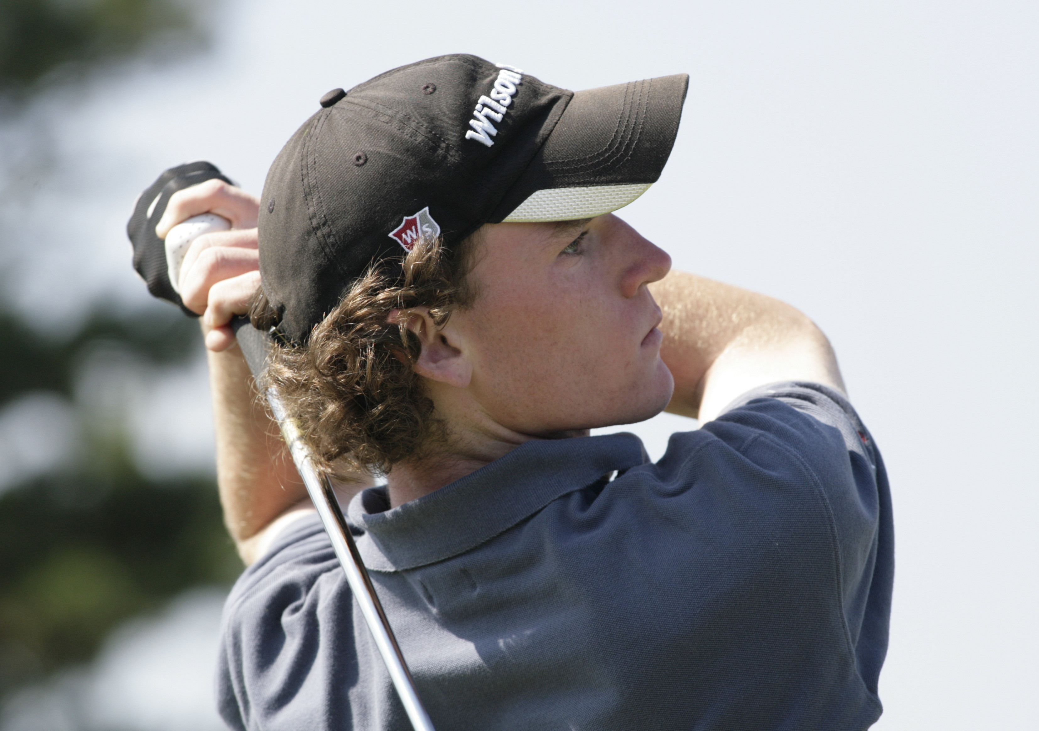 Tim Sluiter, golfprofessional